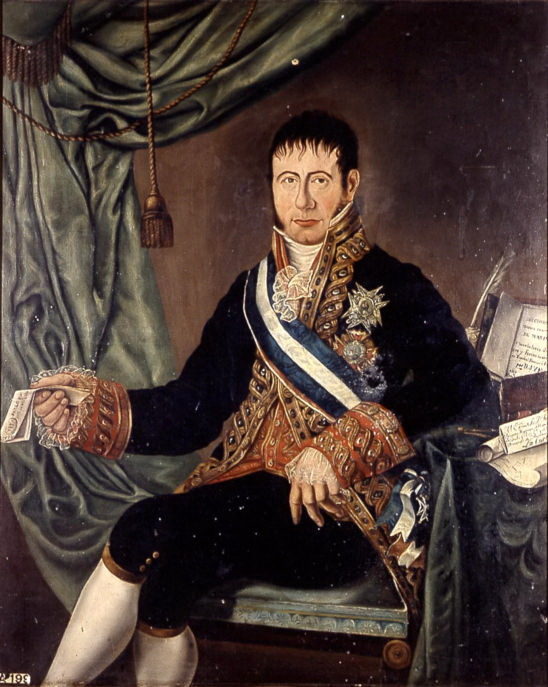 Retrato del marino y politico español José Vázquez de Figueroa (1770-1855), Museo Naval de Madrid.